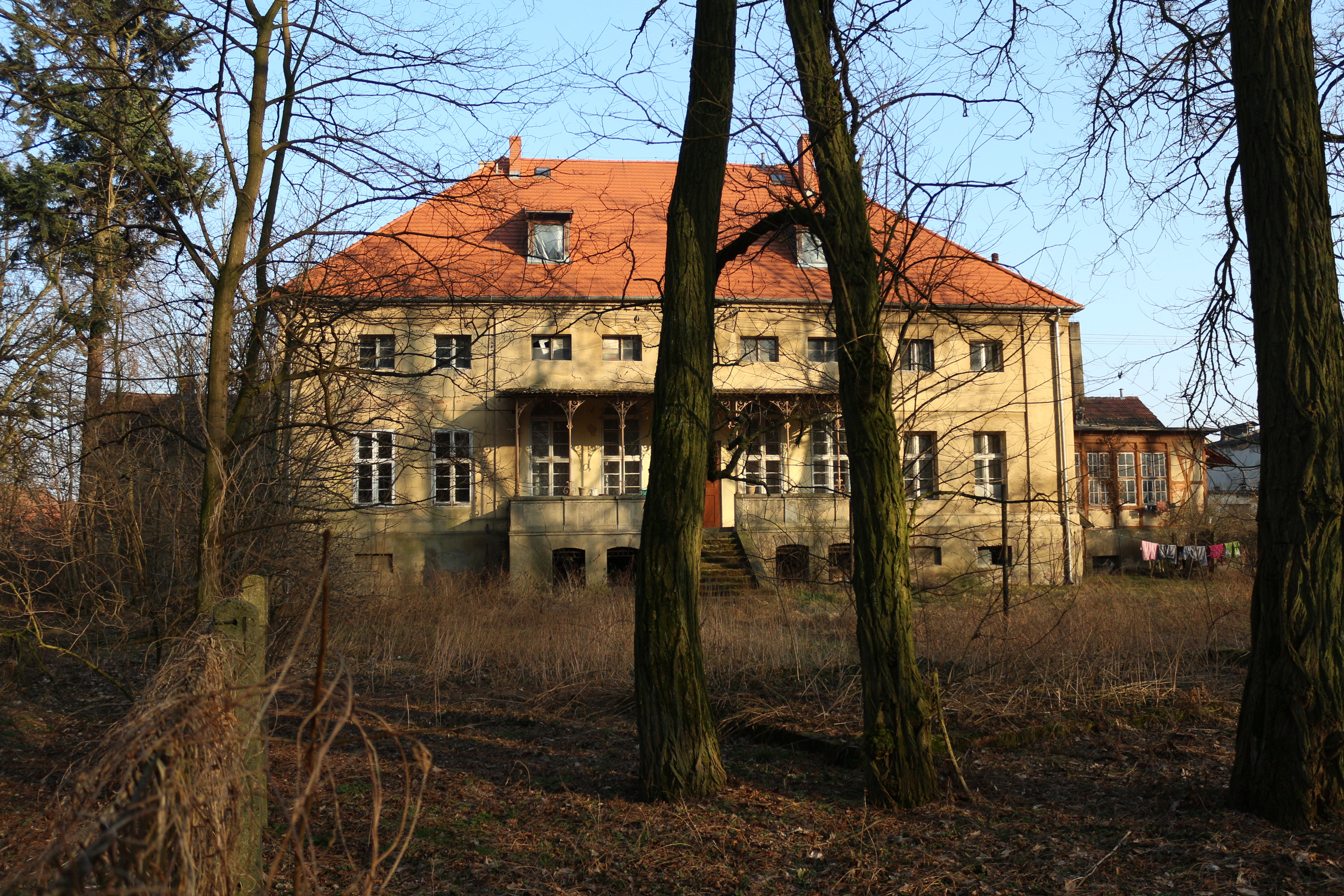 Stare Drzewce, dwór, 1 poł. XIX